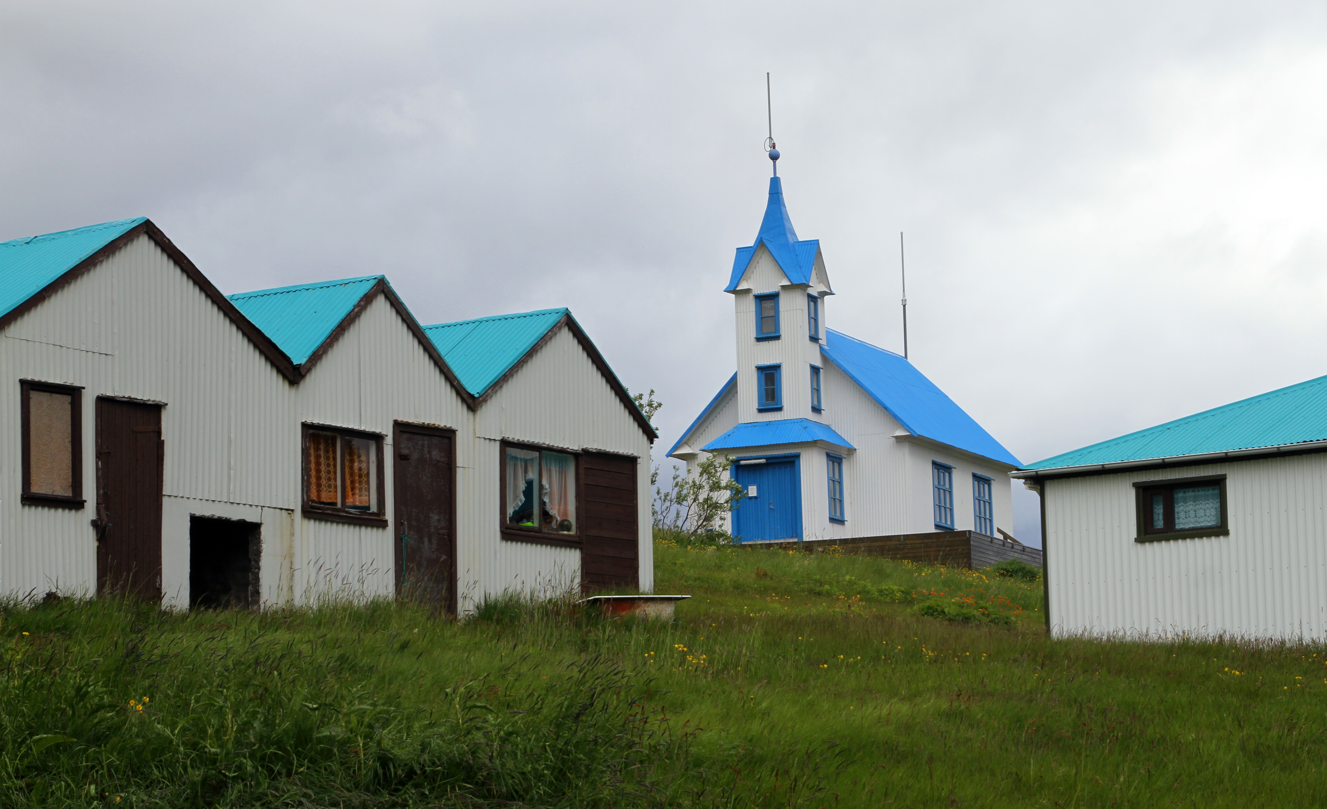 Stöðvarfjörður